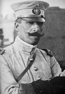 Gral. Felipe Ángeles Ramírez.